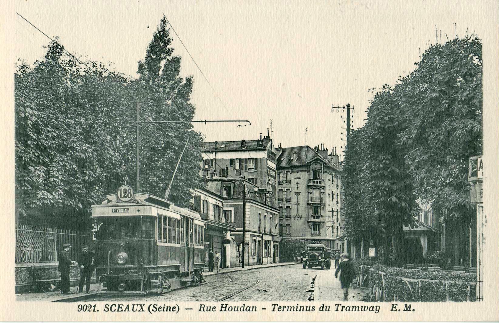 Carte postale ancienne éditée par EM, n°9021 : SCEAUX - Rue Houdan - Terminus du tramway.Motrice de la STCRP sur la ligne 128 : Porte d'Orléans - Sceaux